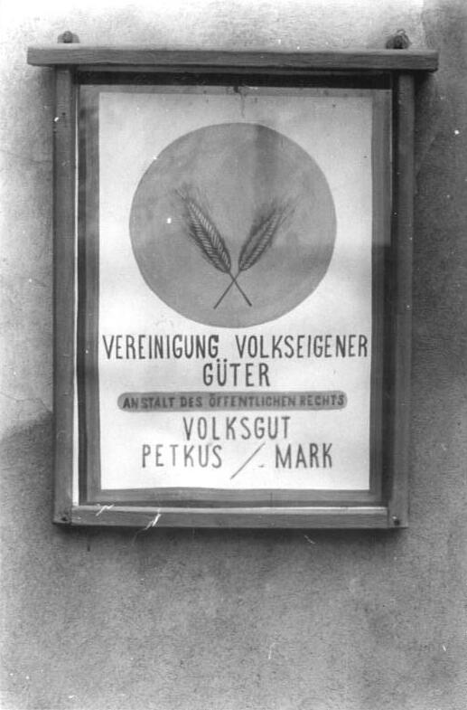 Schild des VEG Petkus Illus Kuhl 18.11.50 8675-5 Berufswettkampf unter Landwirtschaftsschülern. Der erste Teil eines Berufswettkampfes zwischen den Schülern der Berufsschulen Baruth, Pektus und Rahme im Kreis Luckenwalde fand kürzlich auf dem Volksgut Pektus statt.Die 351 Jugendlichen wurden in 15 Arbeitsgruppen eingeteilt, denen Prüfer zugestellt wurden. Bis März 1951 findet jeden Monat ein weiteter Wettbewerb statt.UBz: Das Schild des Volksgutes.Leihweisse Illlus Berlin 8